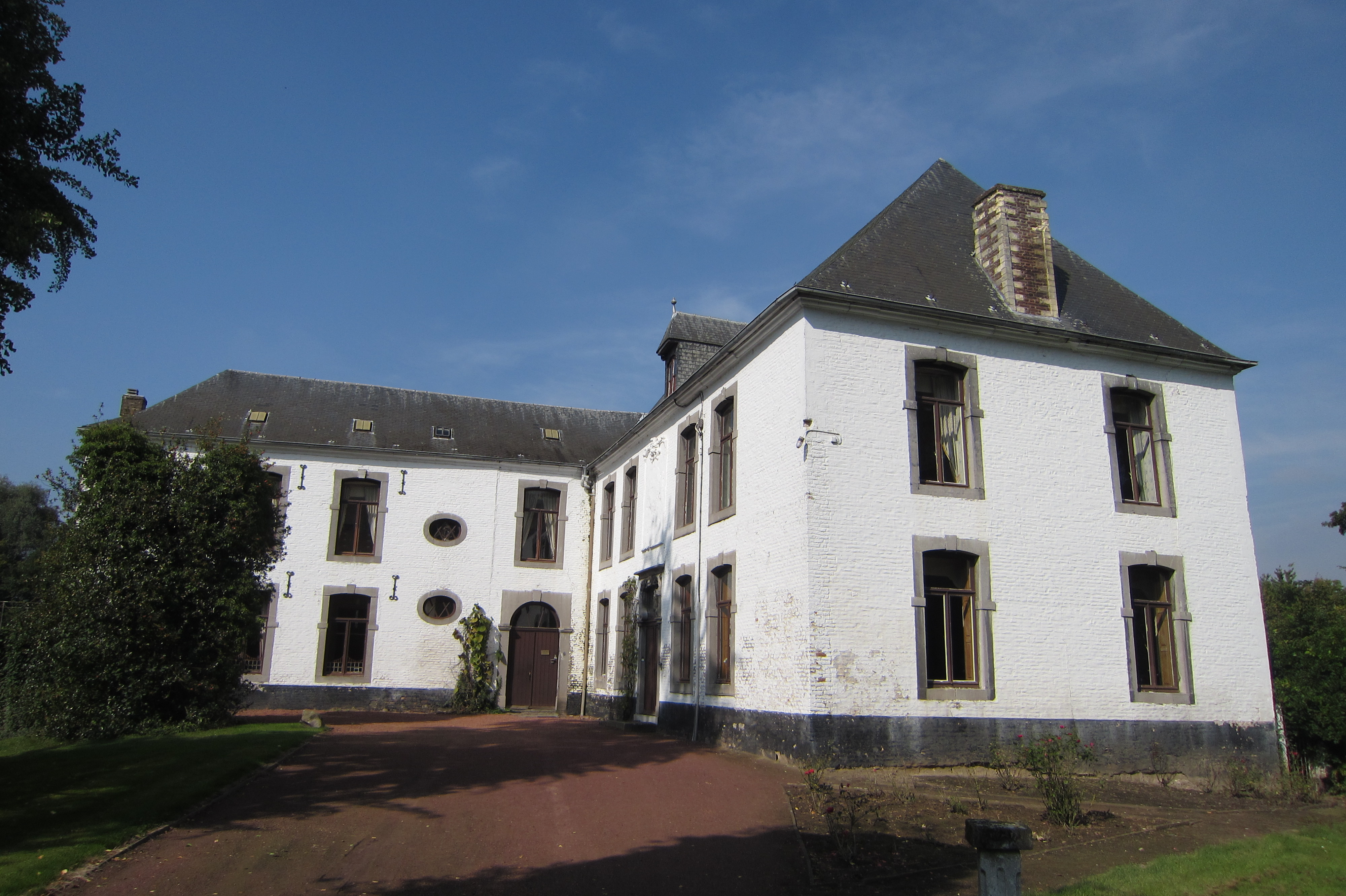 Rentmeesterij of kasteel van Diepenbeek